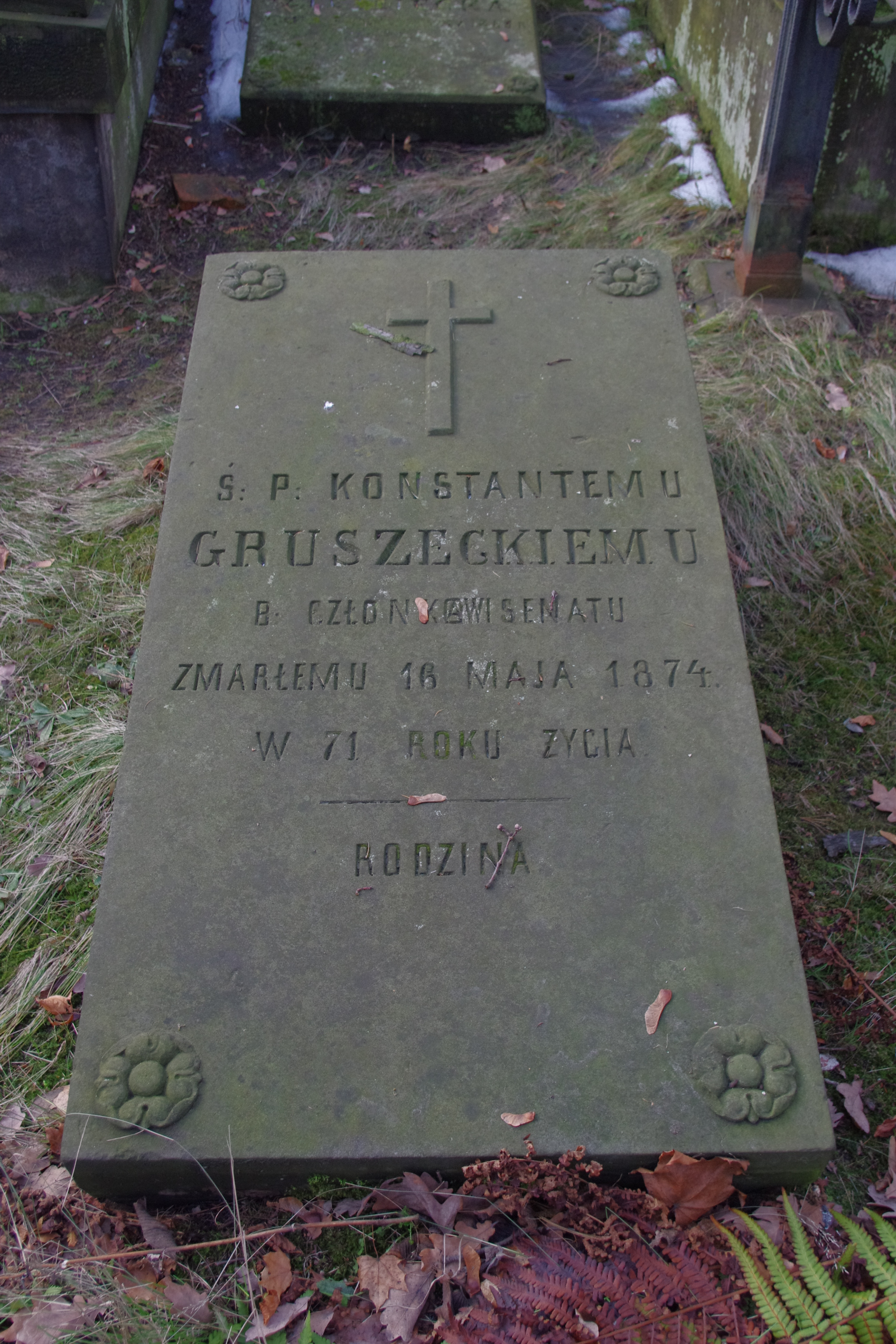 Grób Konstantego Gruszeckiego - sekretarza kancelarii Rady Stanu w latach 1860-1868, na Starych Powązkach w Warszawie